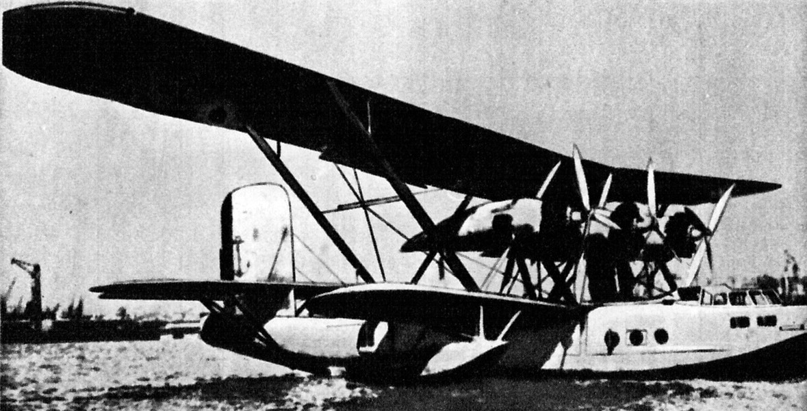 Francuska rozpoznawcza łódź latająca Breguet Br.521.